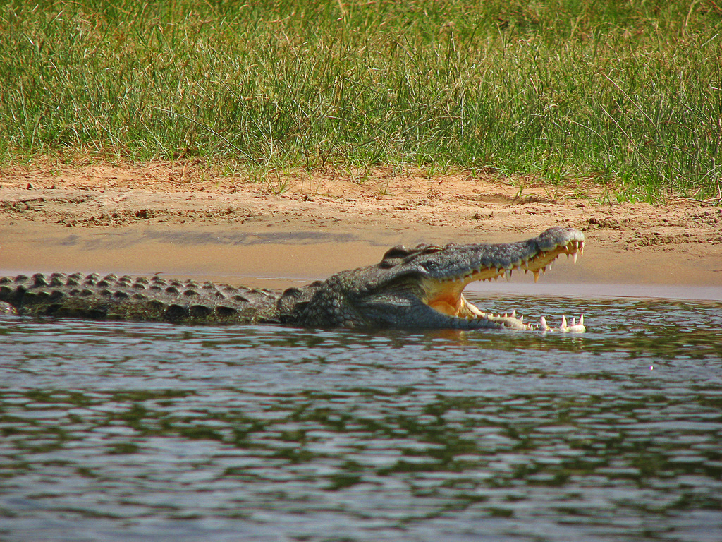 Nile Crocodile (Crocodylus niloticus) in Gulu, Uganda